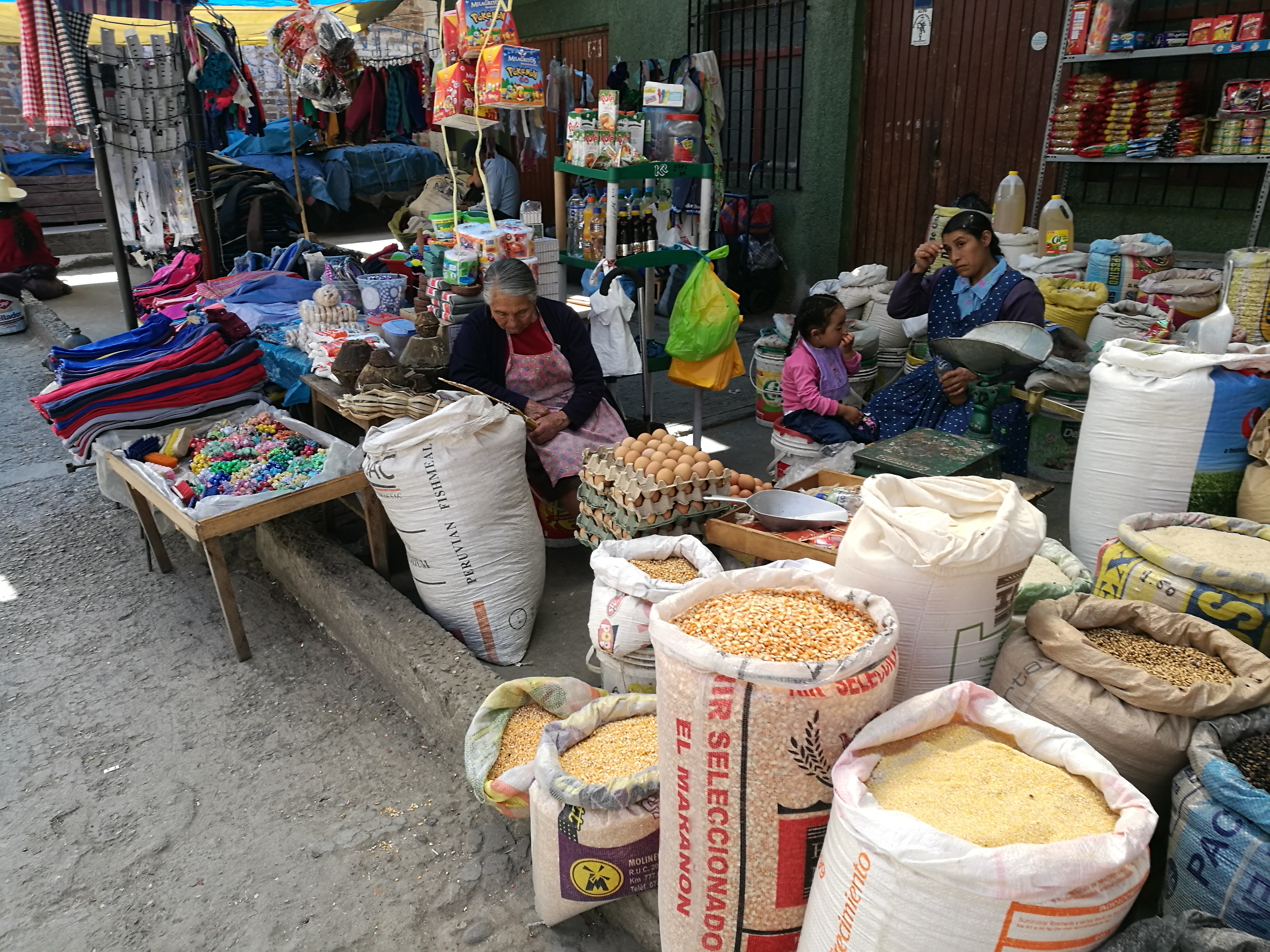 Parada del Mercat del carrer de Cajamarca